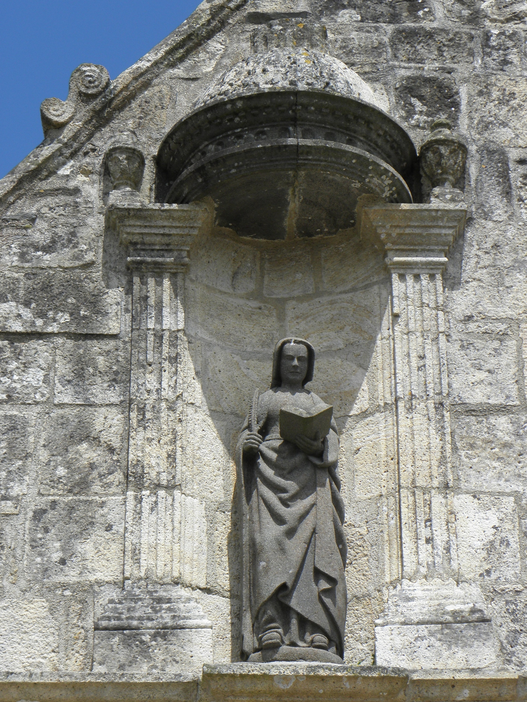 Église Sainte-Pitère du Tréhou (29). Statue de Sainte-Pitère au pignon du porche sud.